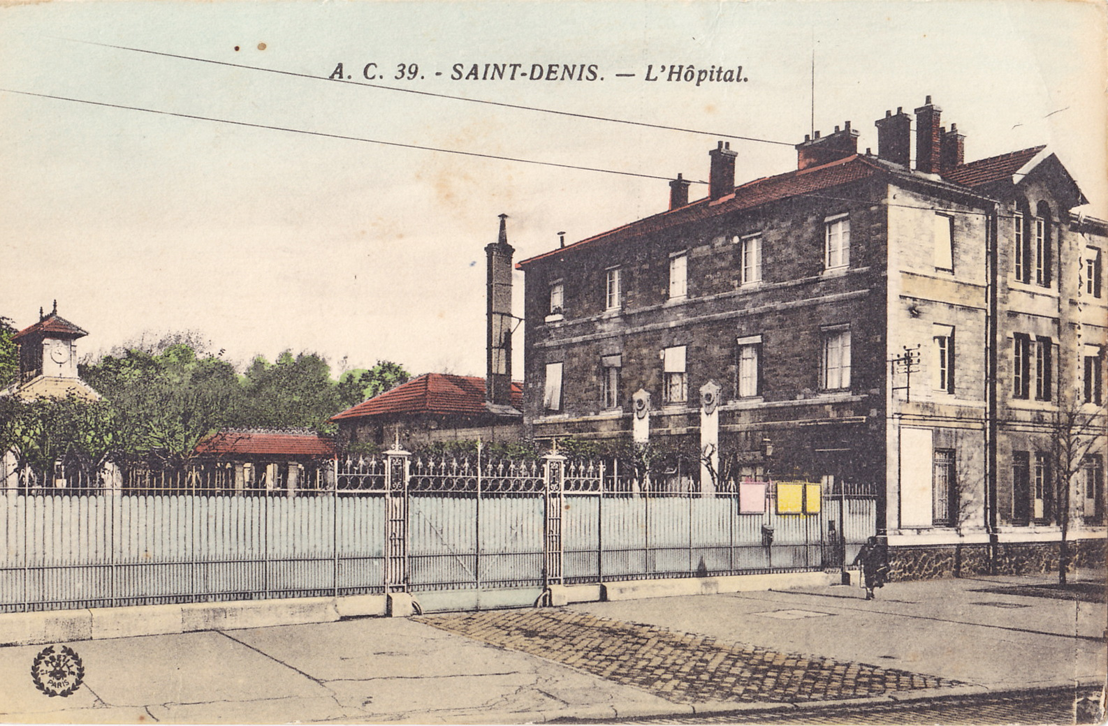 Carte postale ancienne éditée par AC (Abeille à Paris), n°39 :SAINT-DENIS - L'Hôpital